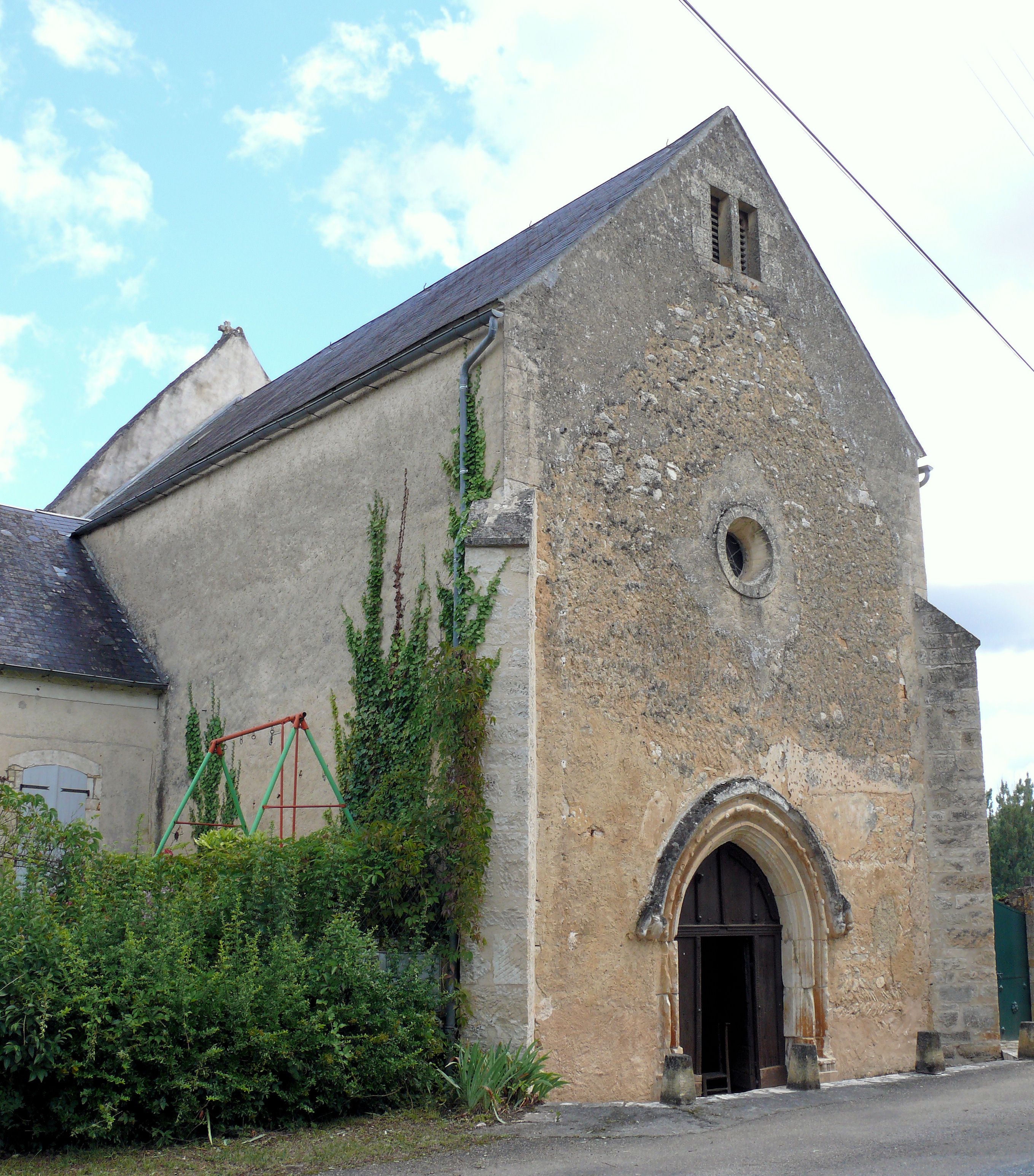 Florimont-Gaumier - Eglise Saint-Pierre-ès-Liens (XIIe siècle) à Gaumier (Dordogne)On distingue quelques assises d'appareil en arête-de-poisson